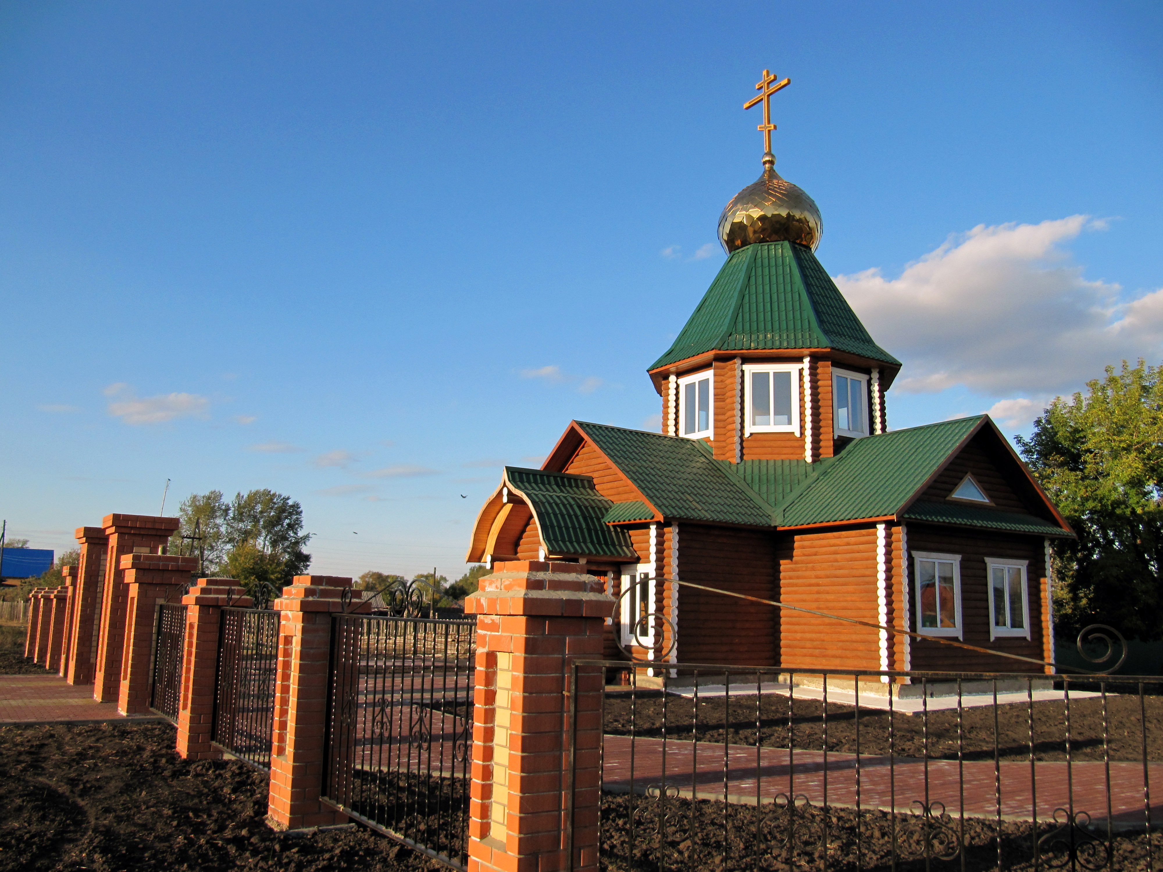 Православный храм в Кособродске